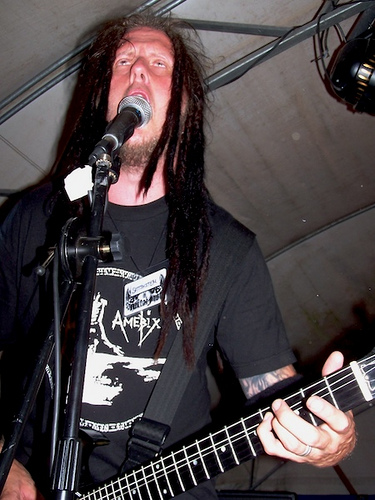 Skitsystem 06.07.07 mutal fest 06 la quiete, the eyes, cinder, enoch ardon, possesion, etc